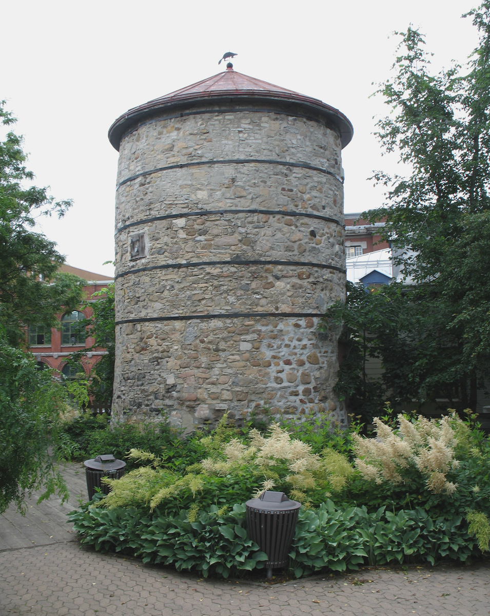 Moulin à vent de l'Hôpital-Général-de-Québec, Ville de Québec (Québec) Canada. Boulevard Langelier. Le moulin a été reconnu bien archéologique du Québec en 1988. Son terrain est maintenant aménagé en un petit parc public.